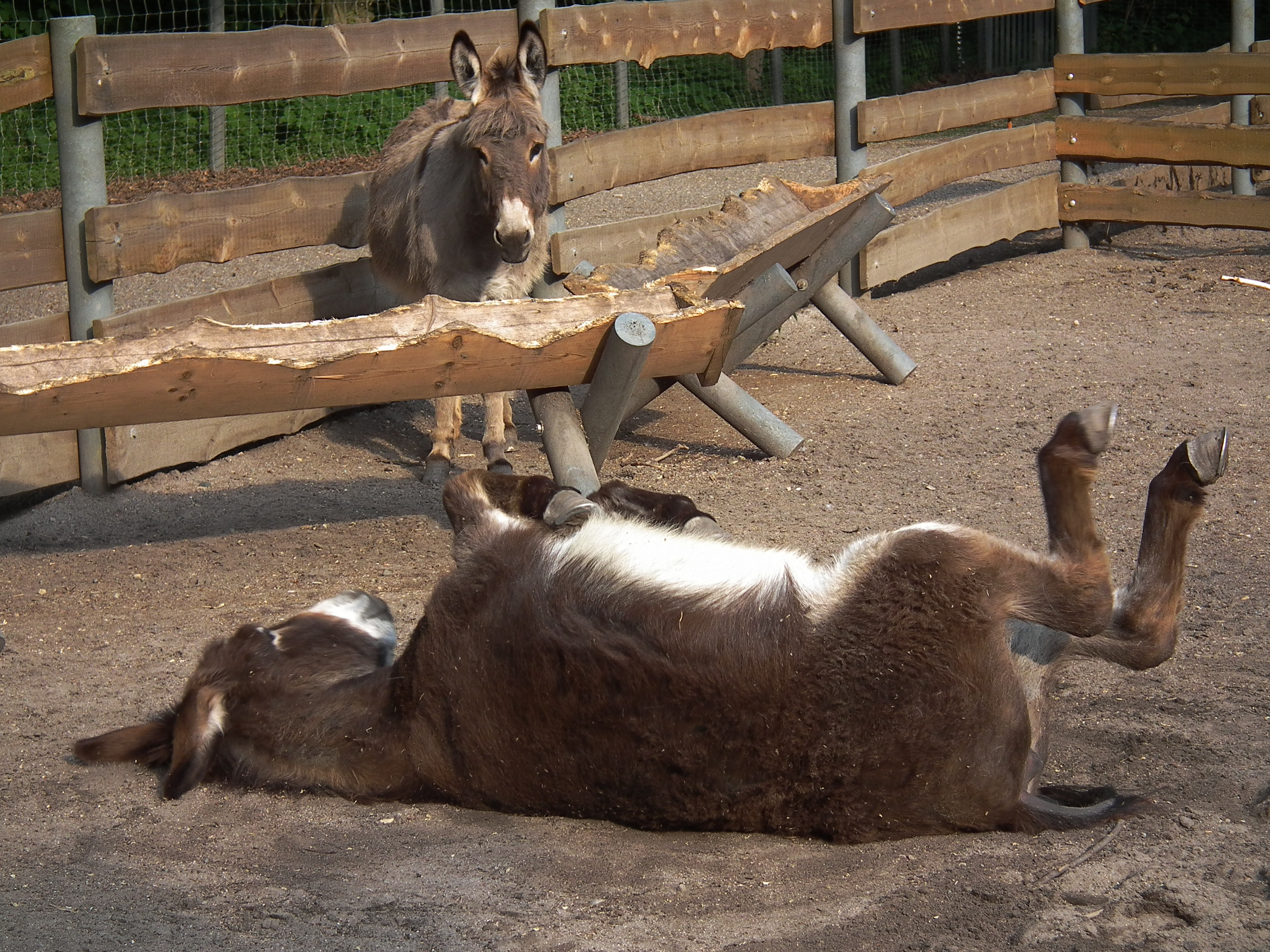 Esel im Wildpark Rheingönheim (Rheinland-Pfalz, Deutschland)